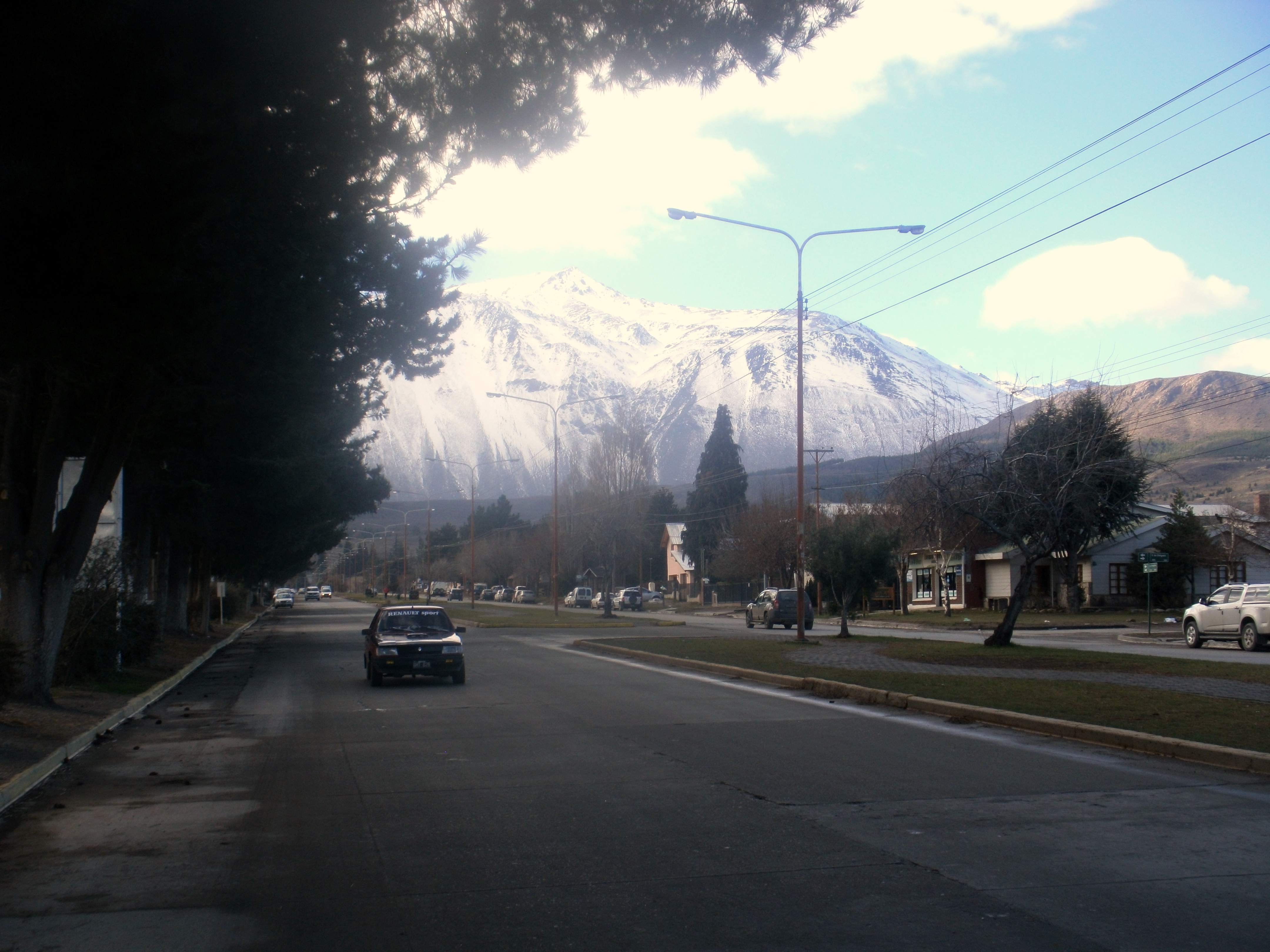 Una de las avenidas principales de la ciudad, de fondo el cerro Veintiuno